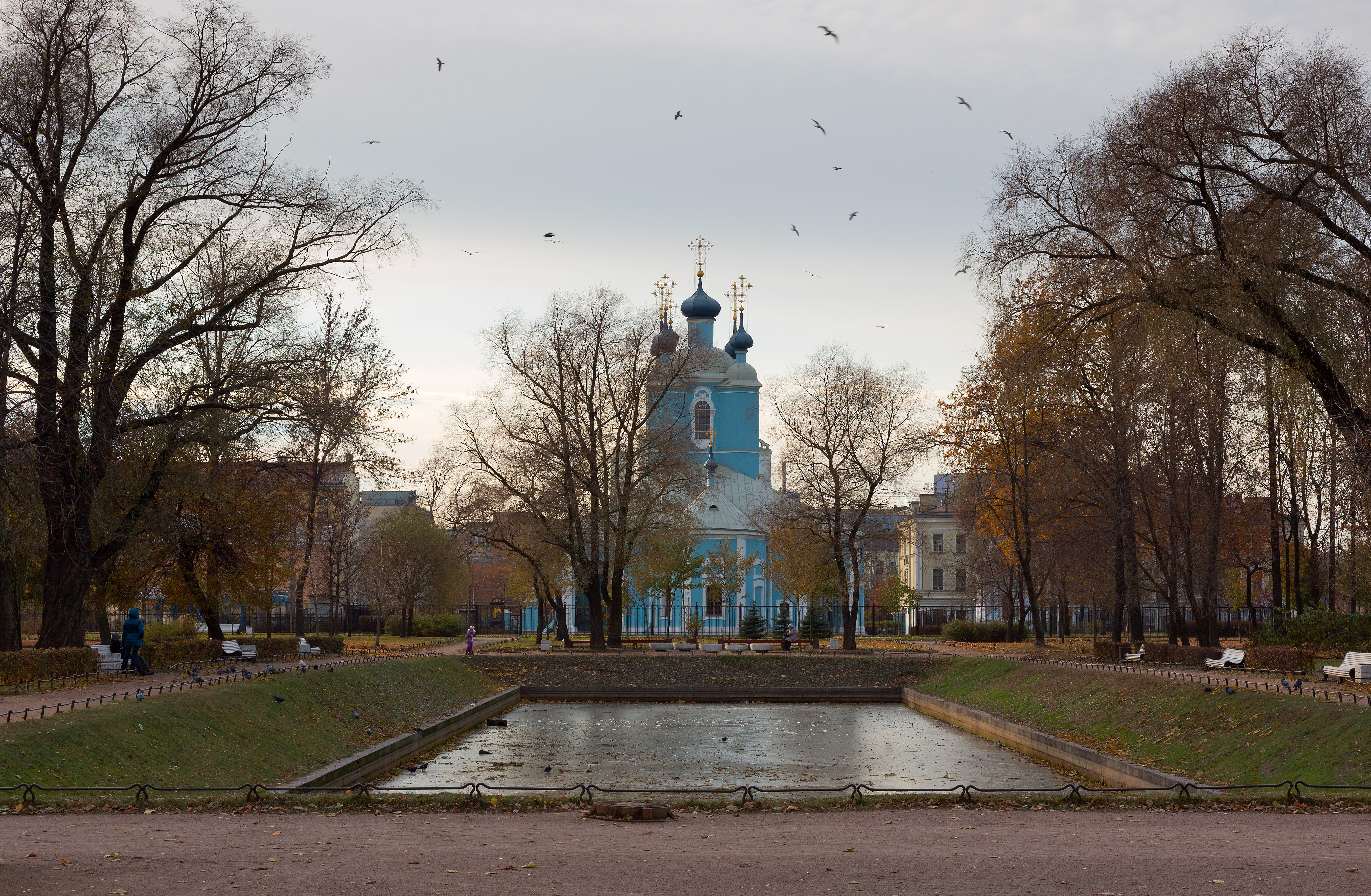 Собор Сампсониевский: проспект Большой Сампсониевский, 39-а, 41, Выборгский район, Санкт-Петербург